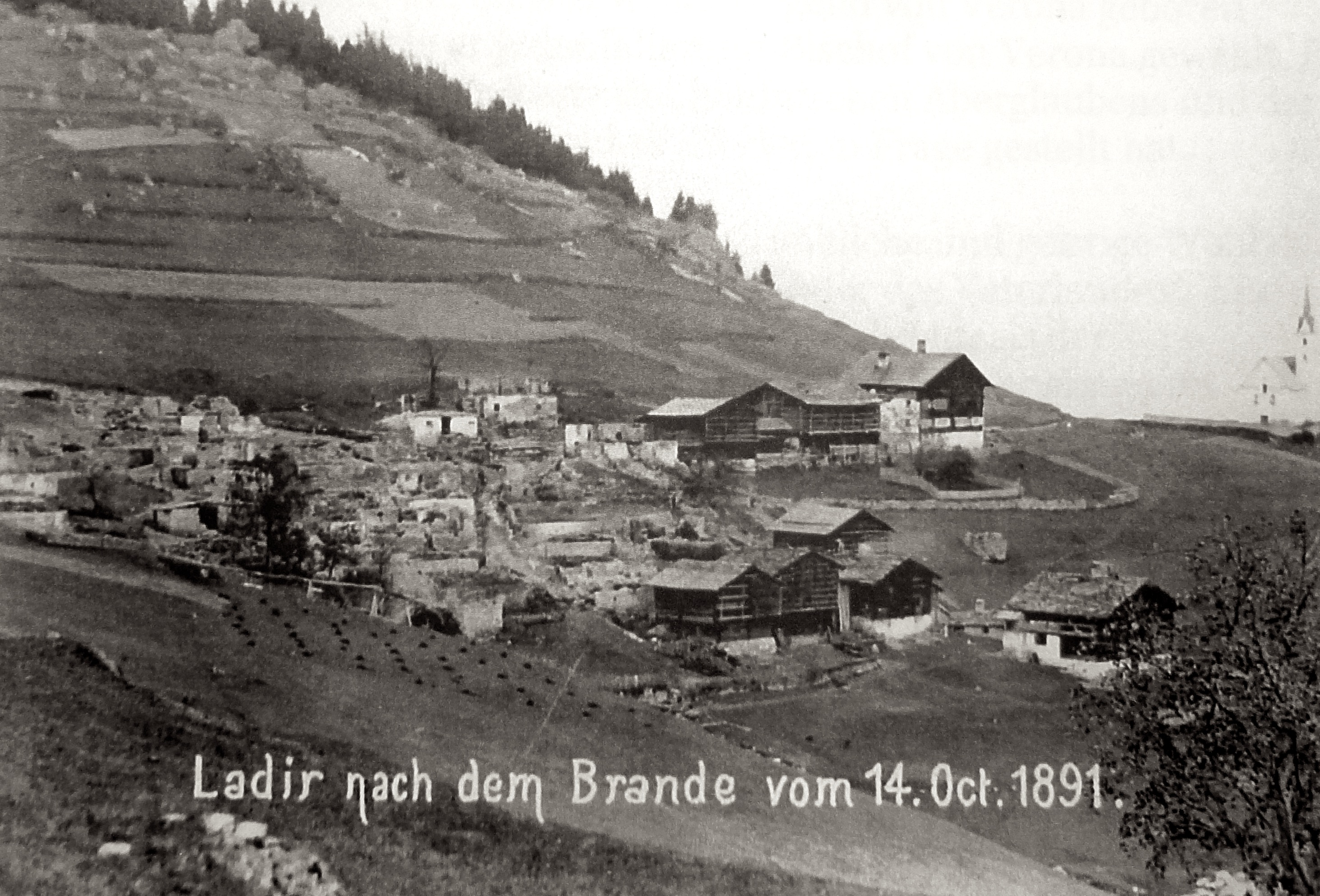 Ladir nach dem Brand vom 14. Oktober 1891